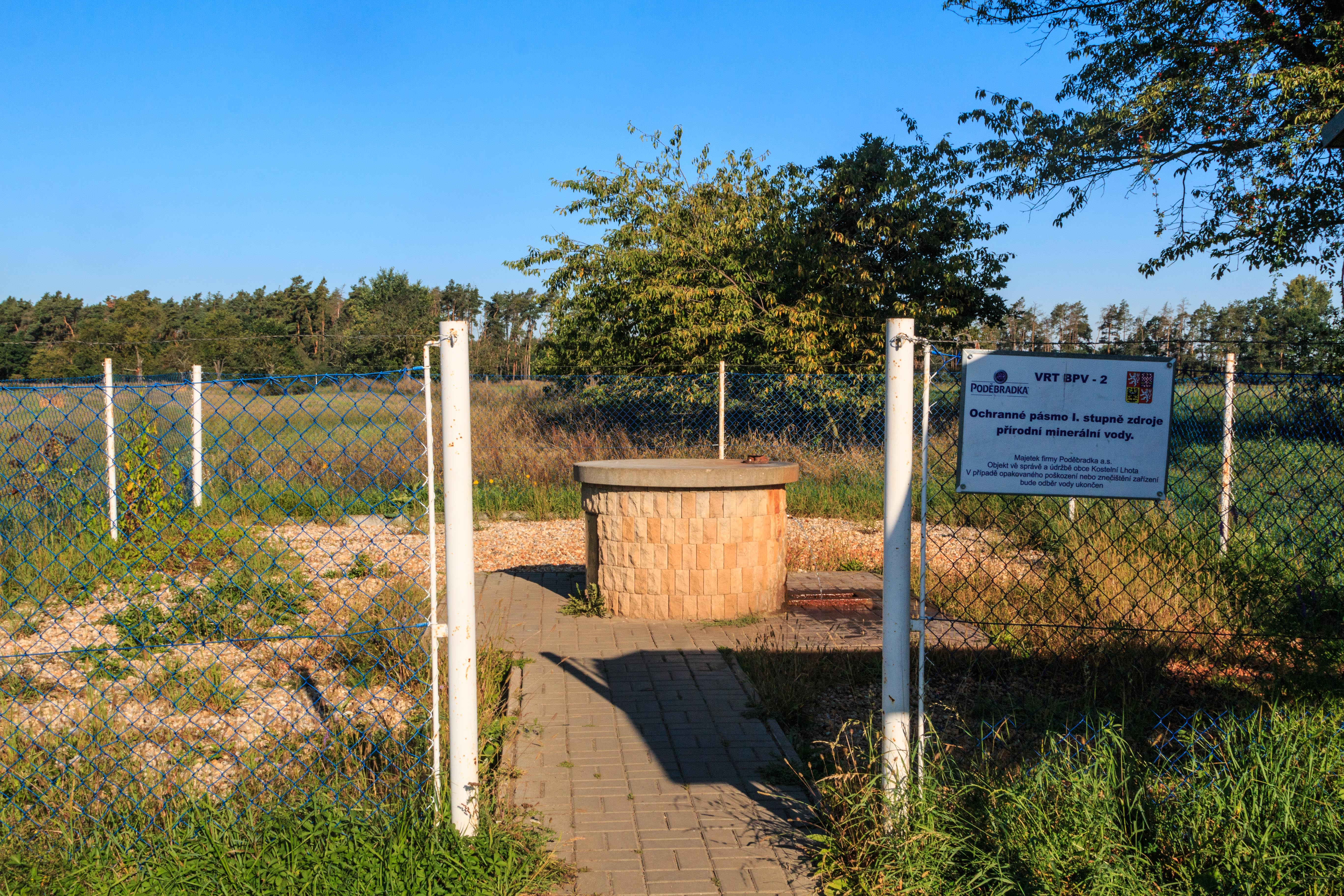 Pramen Výrovka